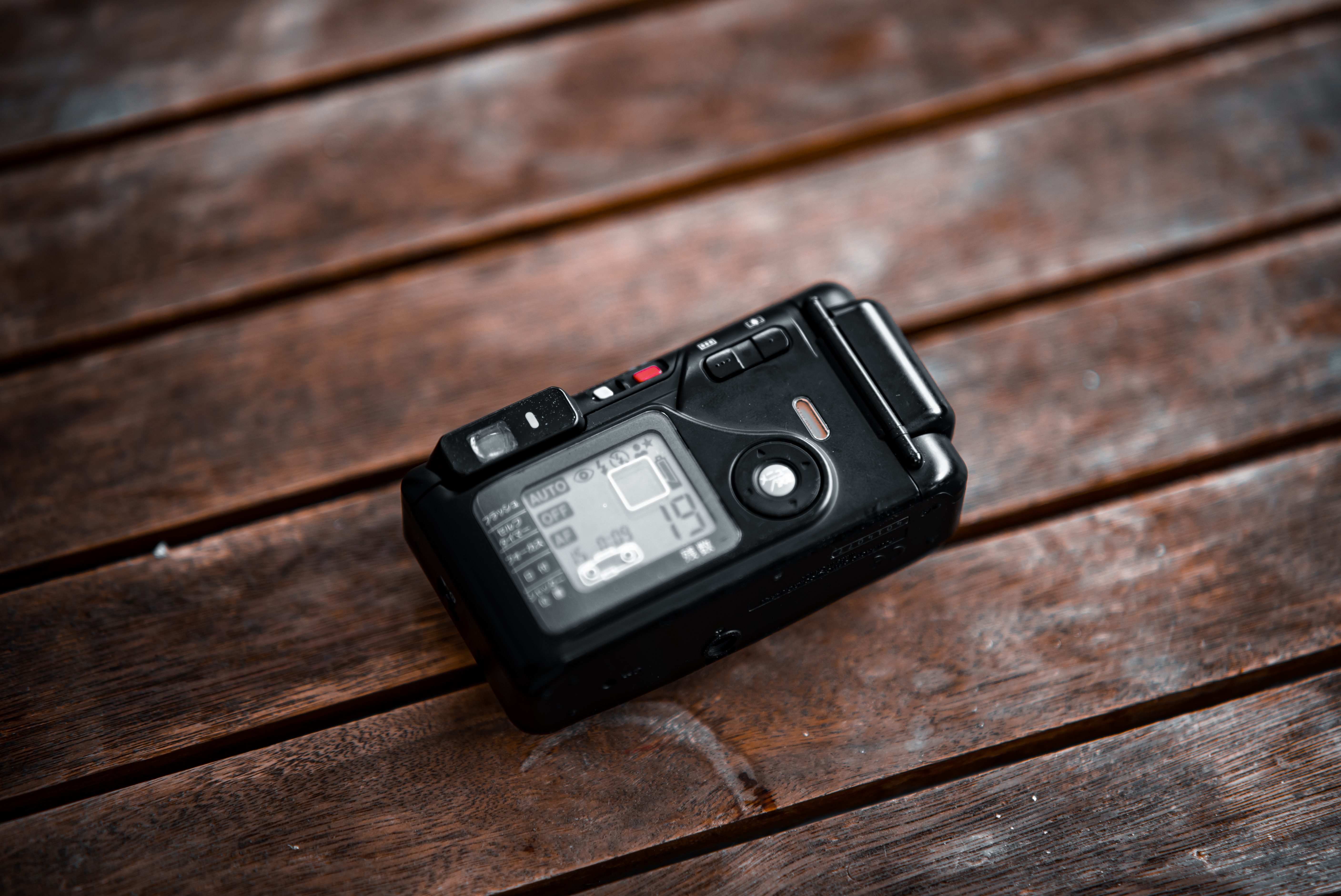 Rückseite der Fujifilm Silvi F2.8 Black Edition